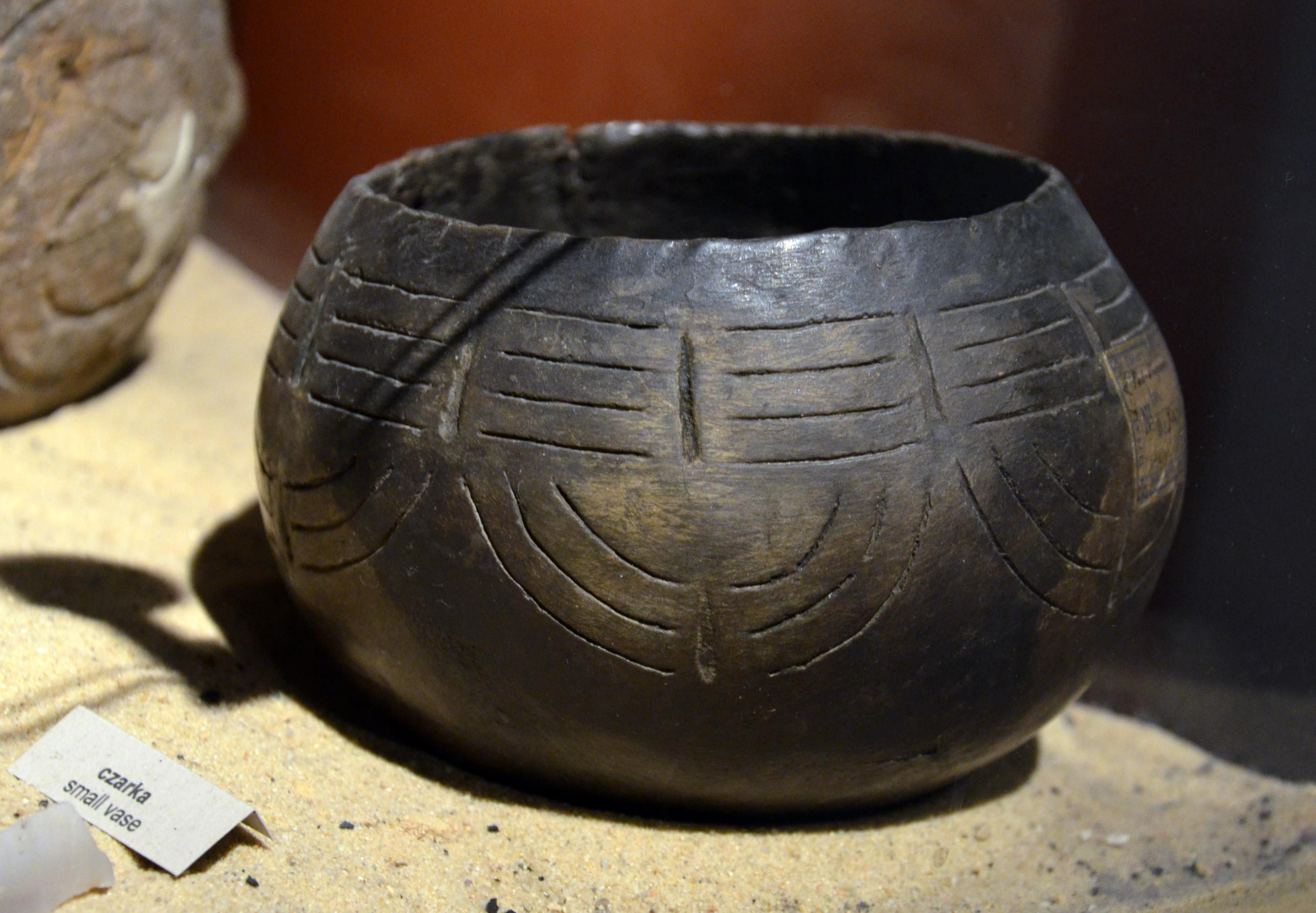 Mitteleuropäische Neolithische Keramik